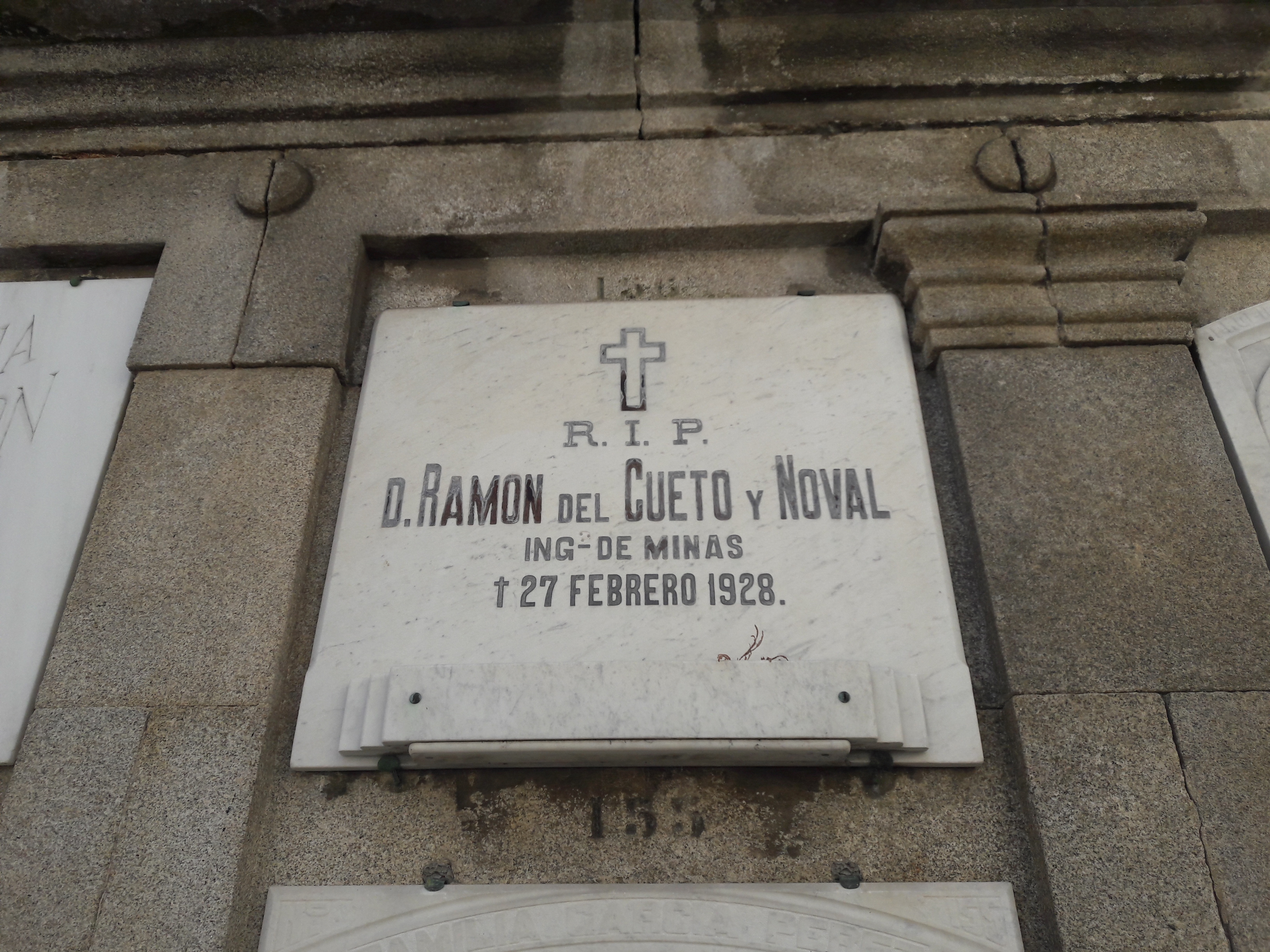 Tumba de Ramón del Cueto no cemiterio de Santo Amaro da Coruña